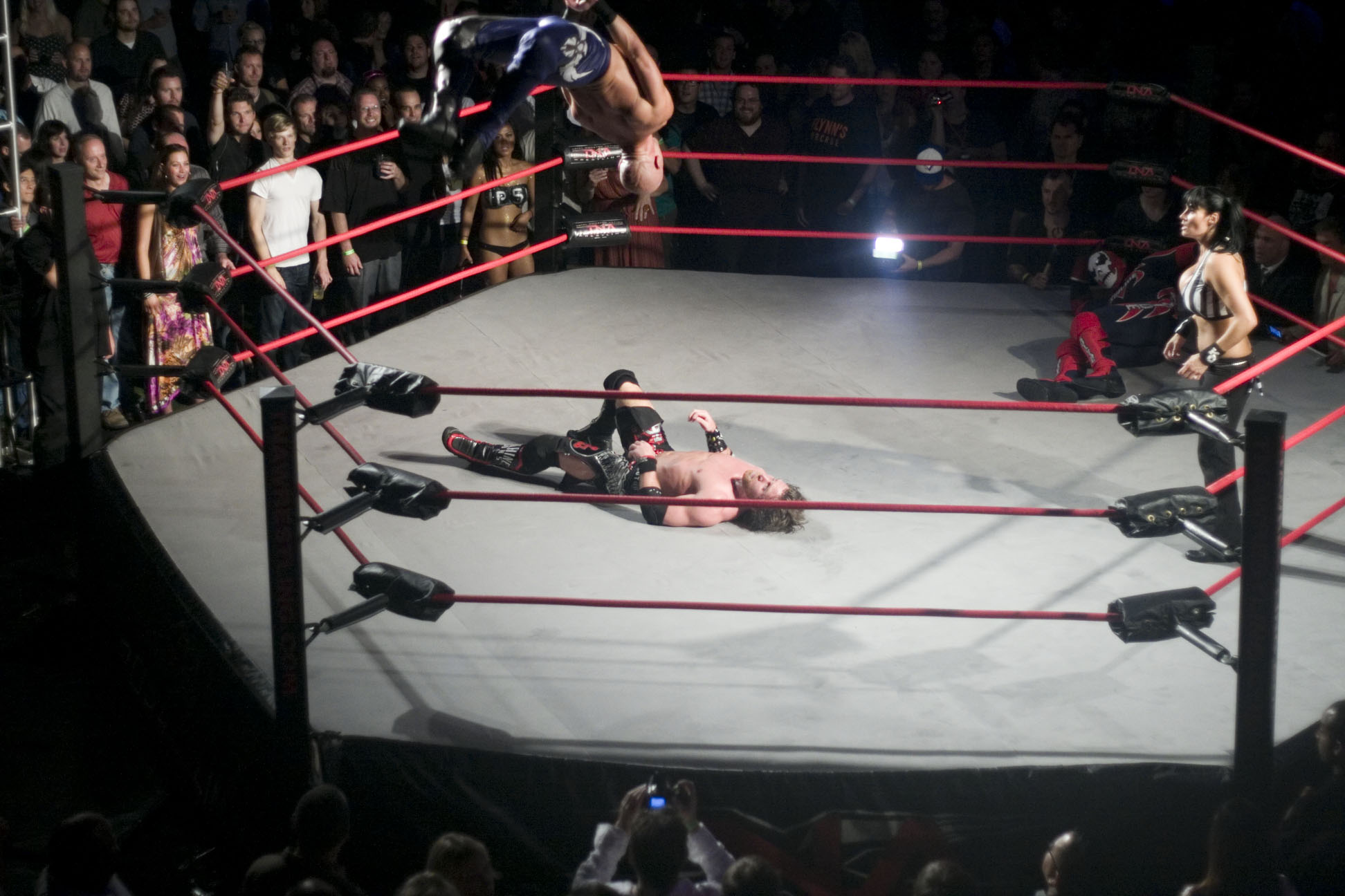 TNA Wrestler Daniels performing a Best Moonsault Ever (BME)